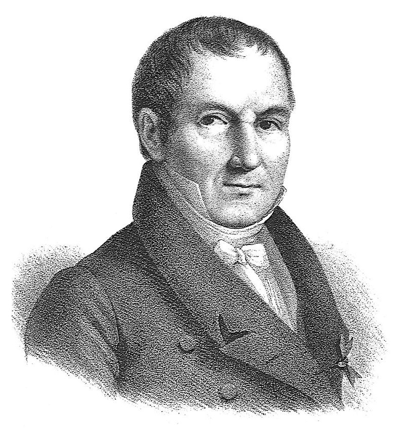 Portrait A. A. Royer-Collard